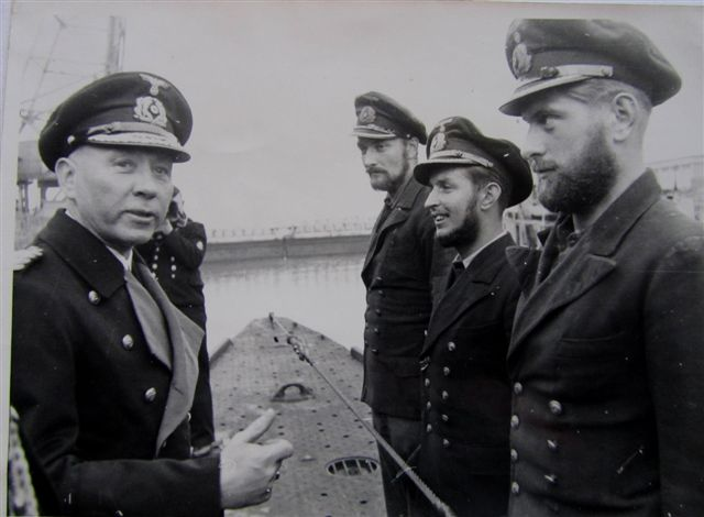 Fotografie von Admiral Eugen Lindau beim Empfang von U 129 in Lorient, dabei Armin Wandel (2. v. re.)